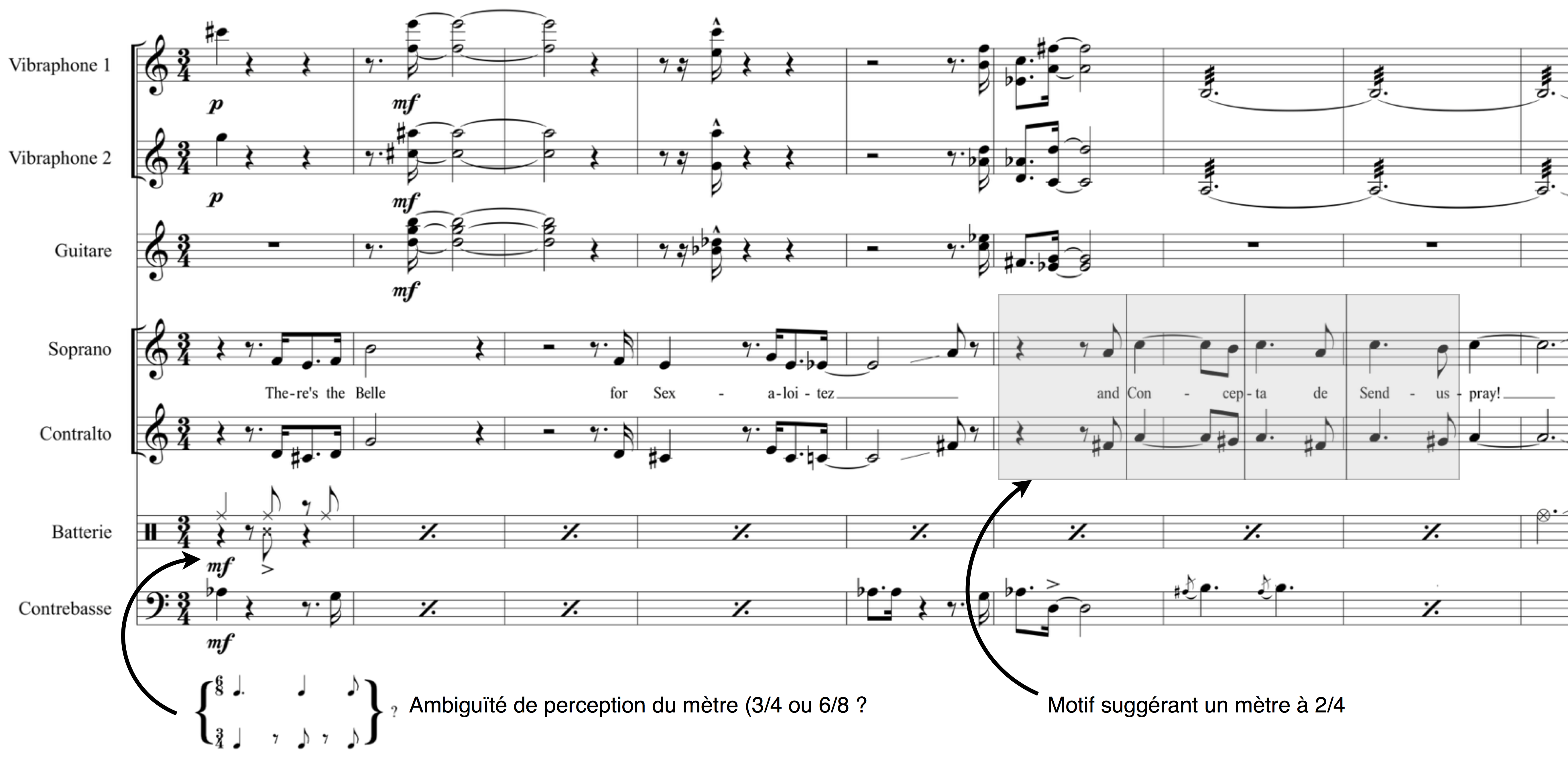 Extrait de la pièce XXI d'Anna Livia Plurabelle d'André Hodeir